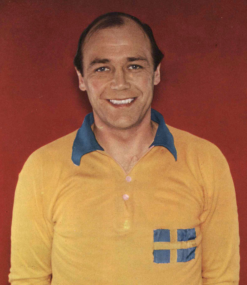 Gunnar Green (1920-1991)